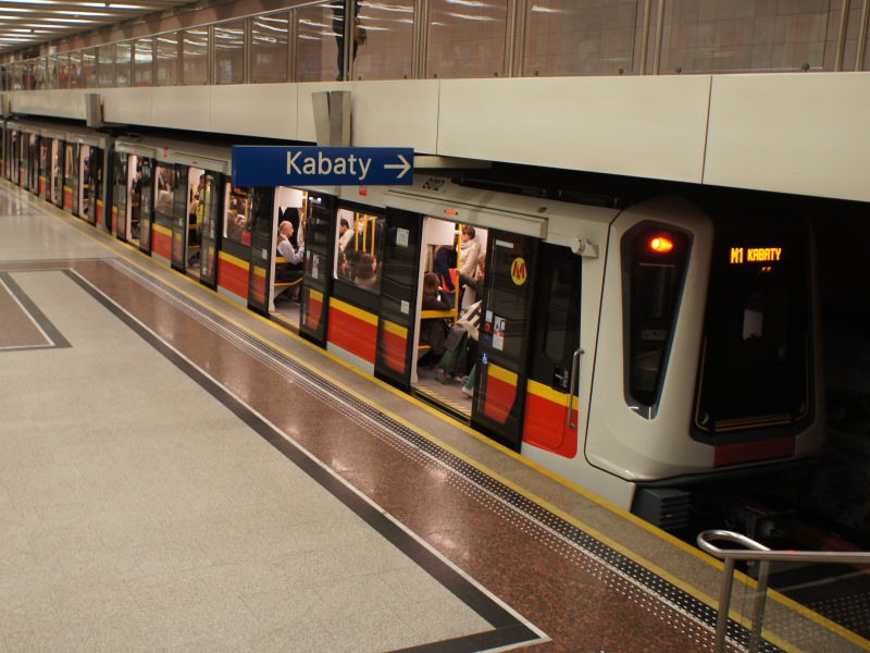 Siemens Inspiro (pociąg numer 52) stoi na stacji A7 Wilanowska.